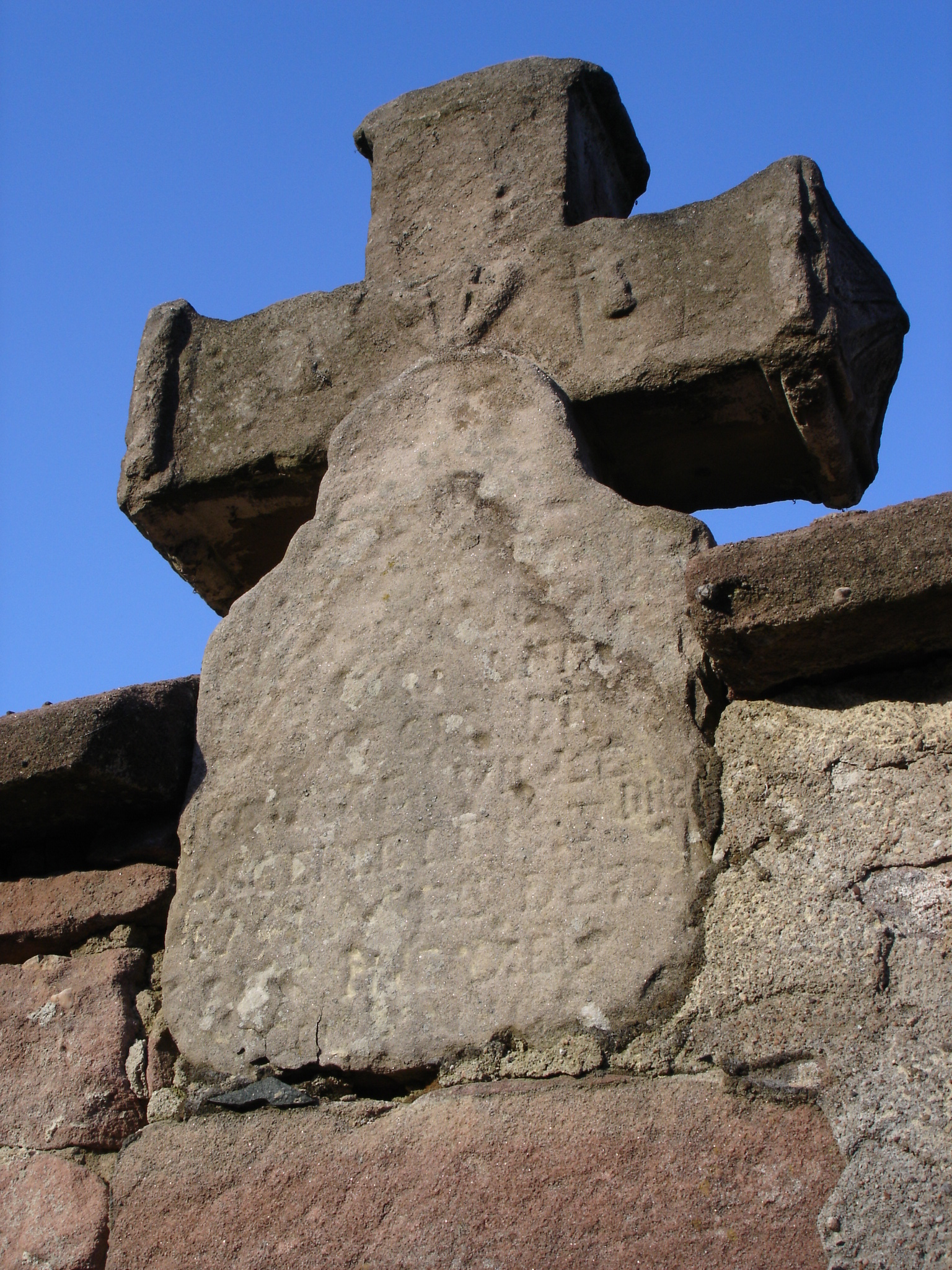 croix de sépulture en grès rose, incorporée dans un mur, rue Aristide Briand à Raon l'Etape 88372